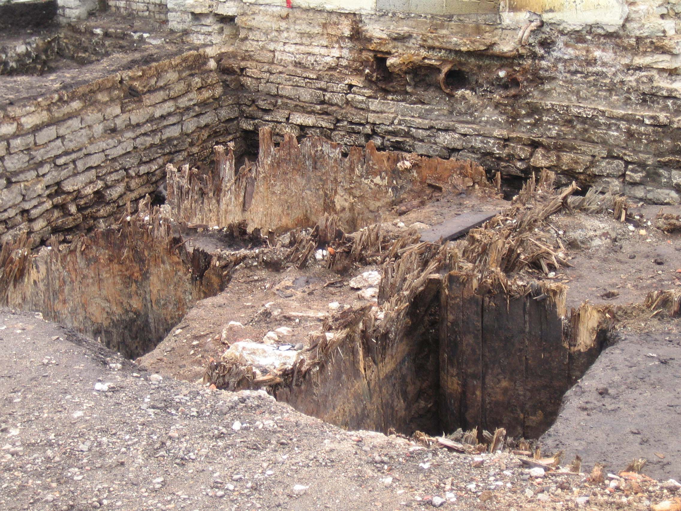 Puidust nahaparkimistünnide jäänused keldris Maakri 19 krundil.